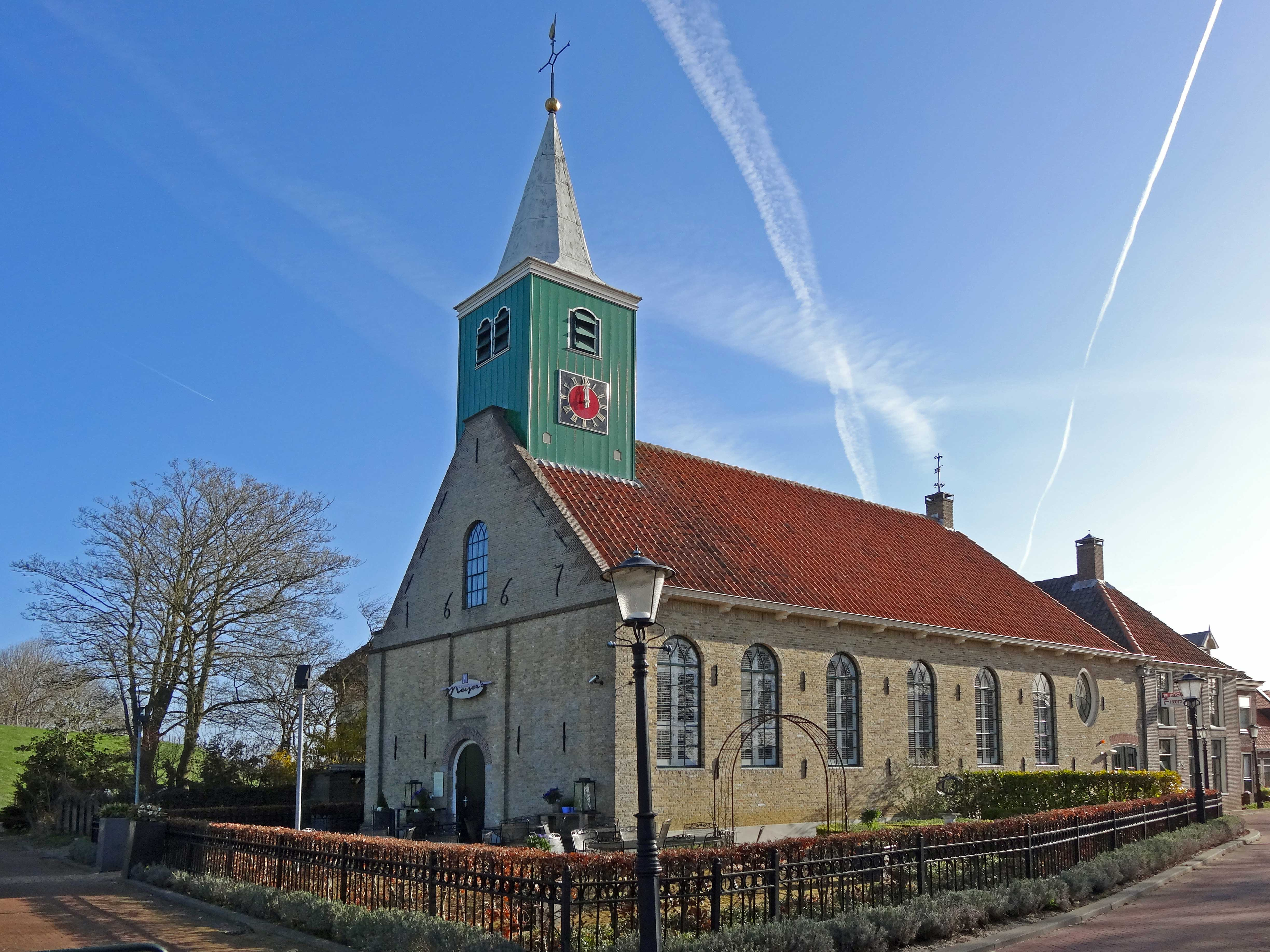 Voormalige hervormde kerk in Andijk